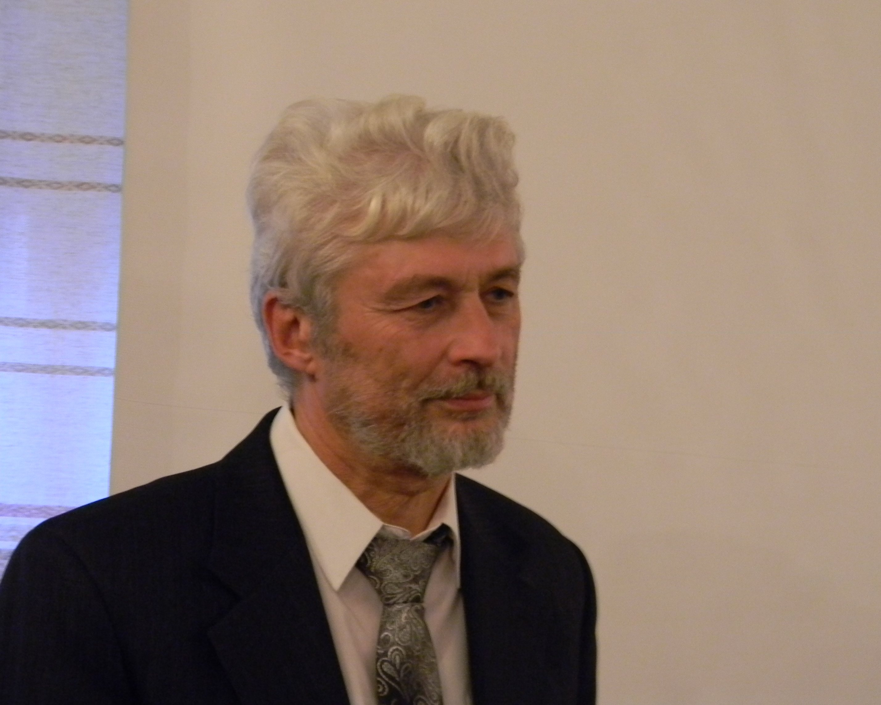 Анатолій Горовий